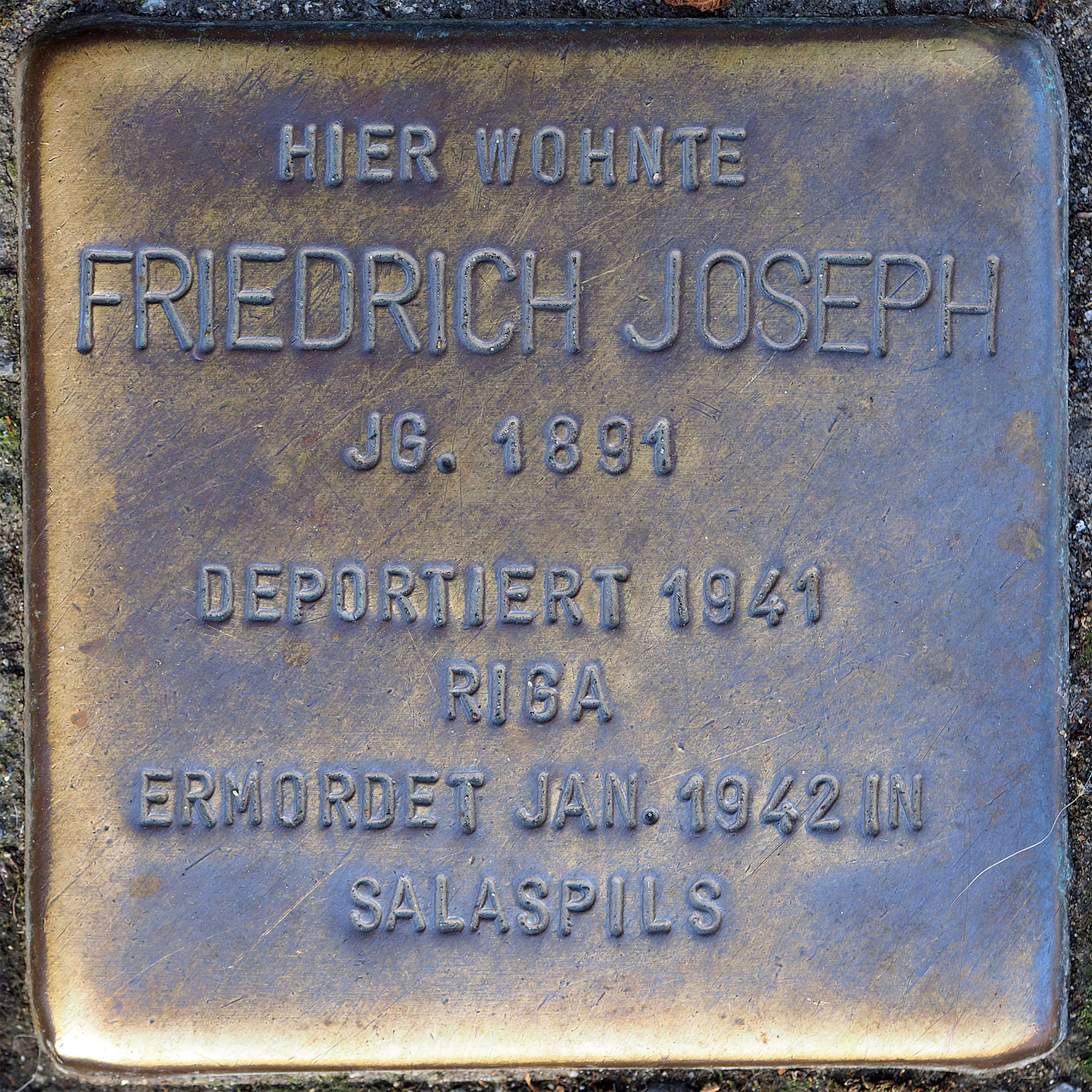 Stolpersteine MG: Joseph, Friedrich